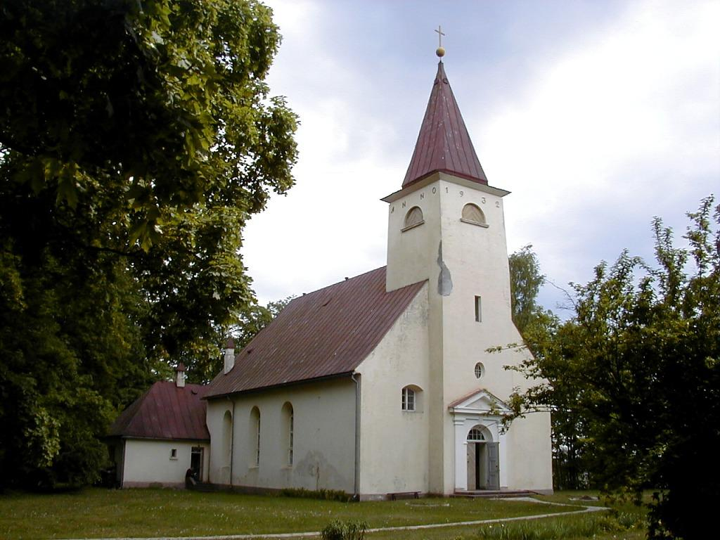 Lielvārdes luterāņu baznīca